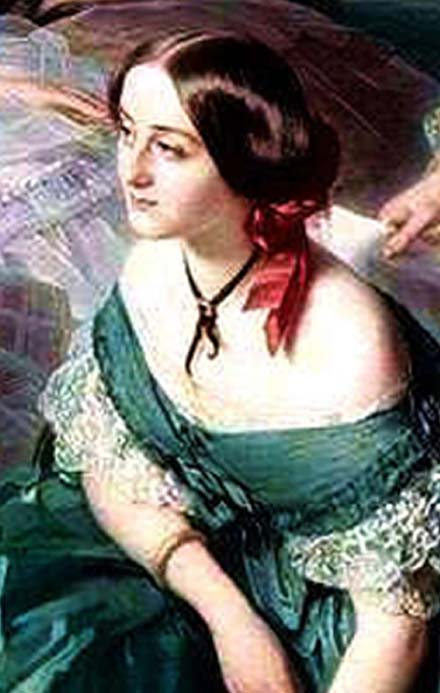 Villeneuve-Bargemon (Adrienne de) Eugénie von Frankreich mit ihren Hofdamen